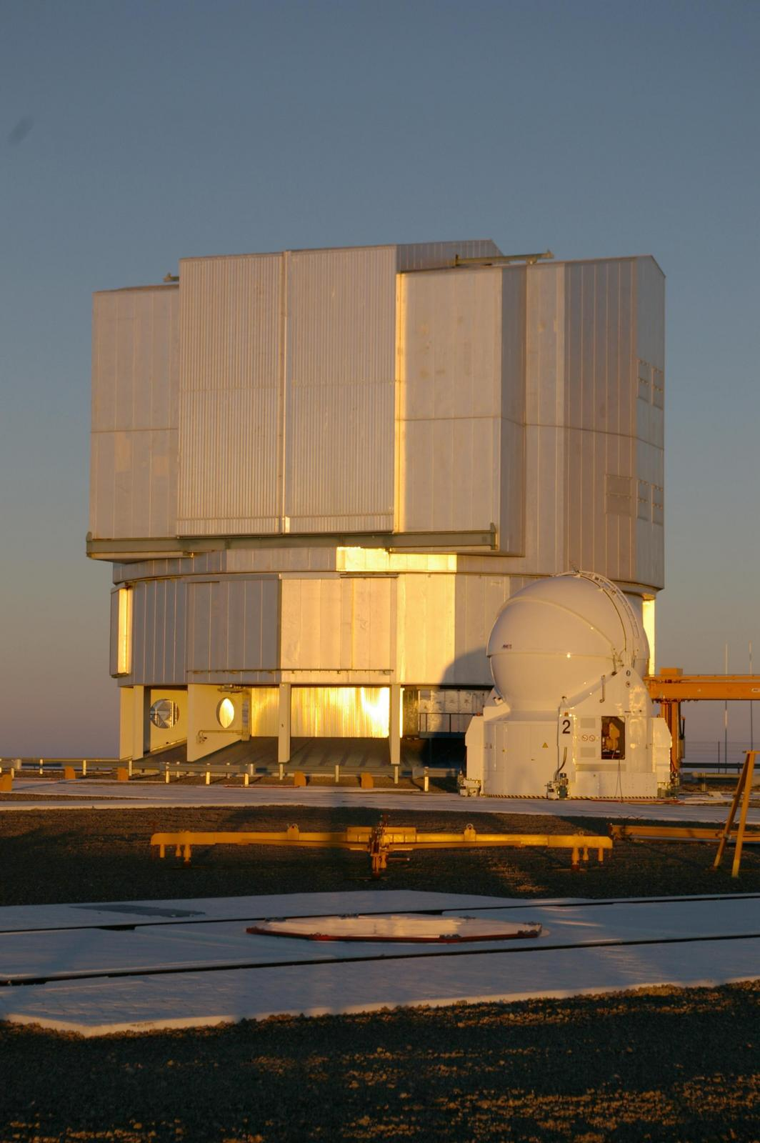 Paranal-Observatorium, Antu- und AT-Kuppel, im Vordergrund eine der Stationen für die verschiebbaren ATs